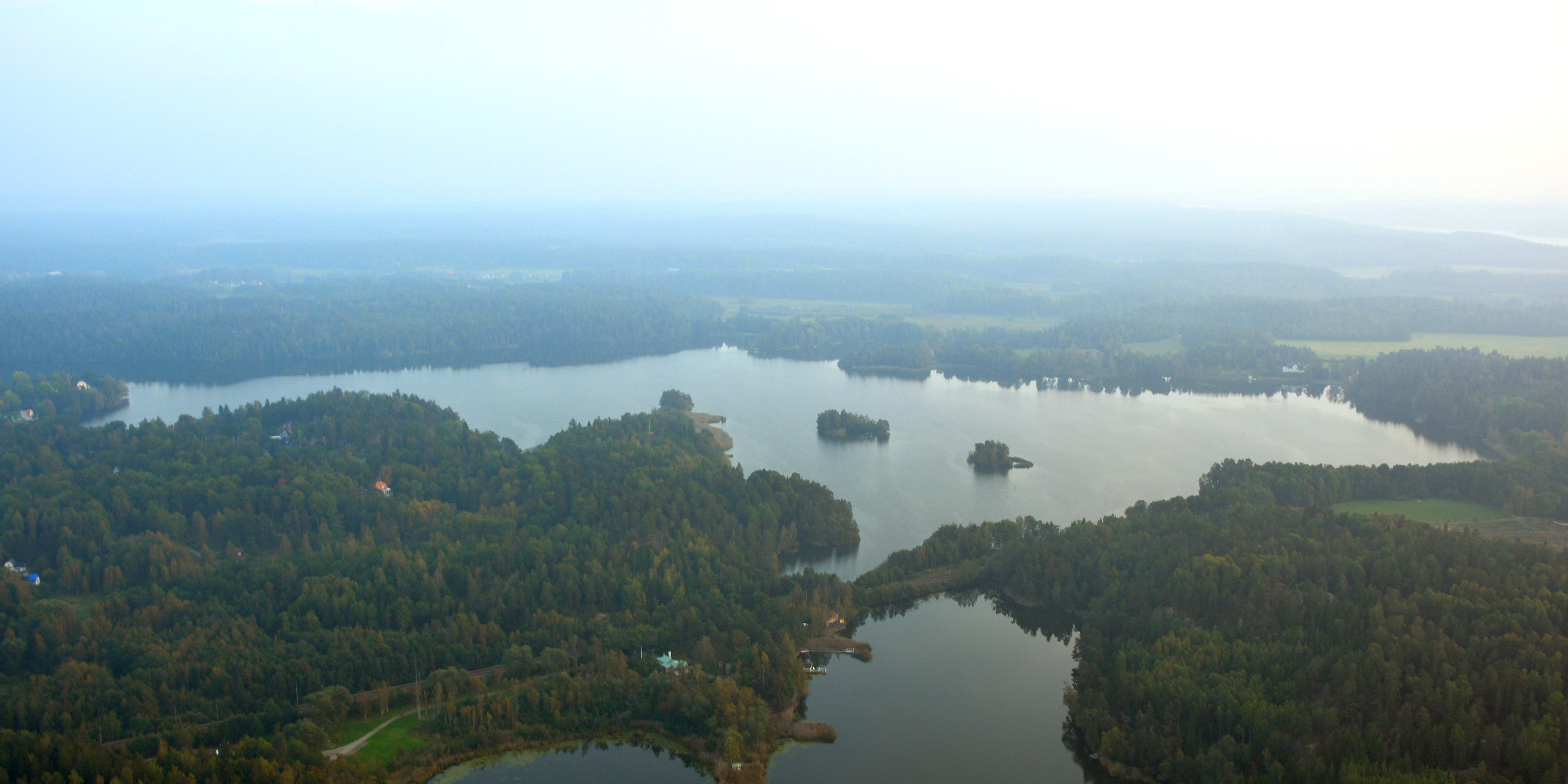 Sjön Uttran.